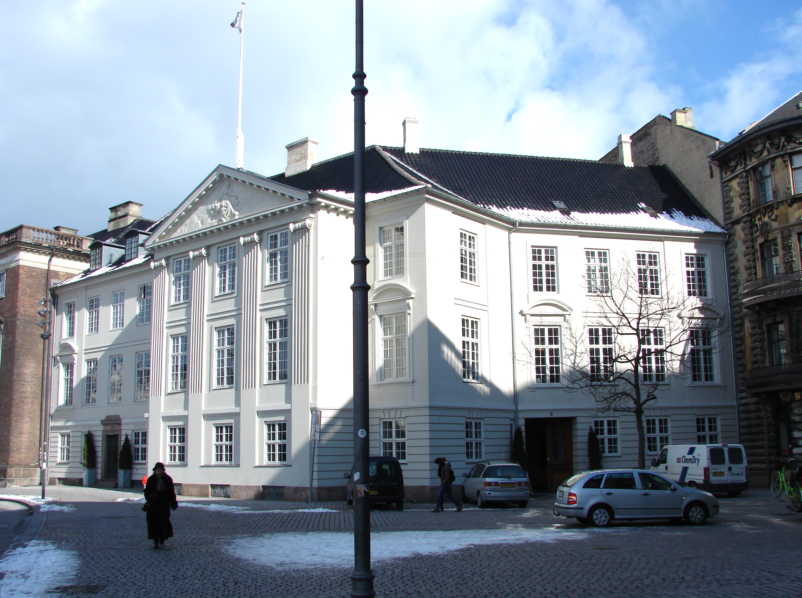 Harsdorffs Hus ved Kongens Nytorv, København